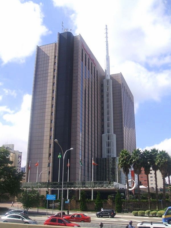 Hotel Mercure, na Av. 23 de Maio, distrito de Vila Mariana, São Paulo, Brasil.